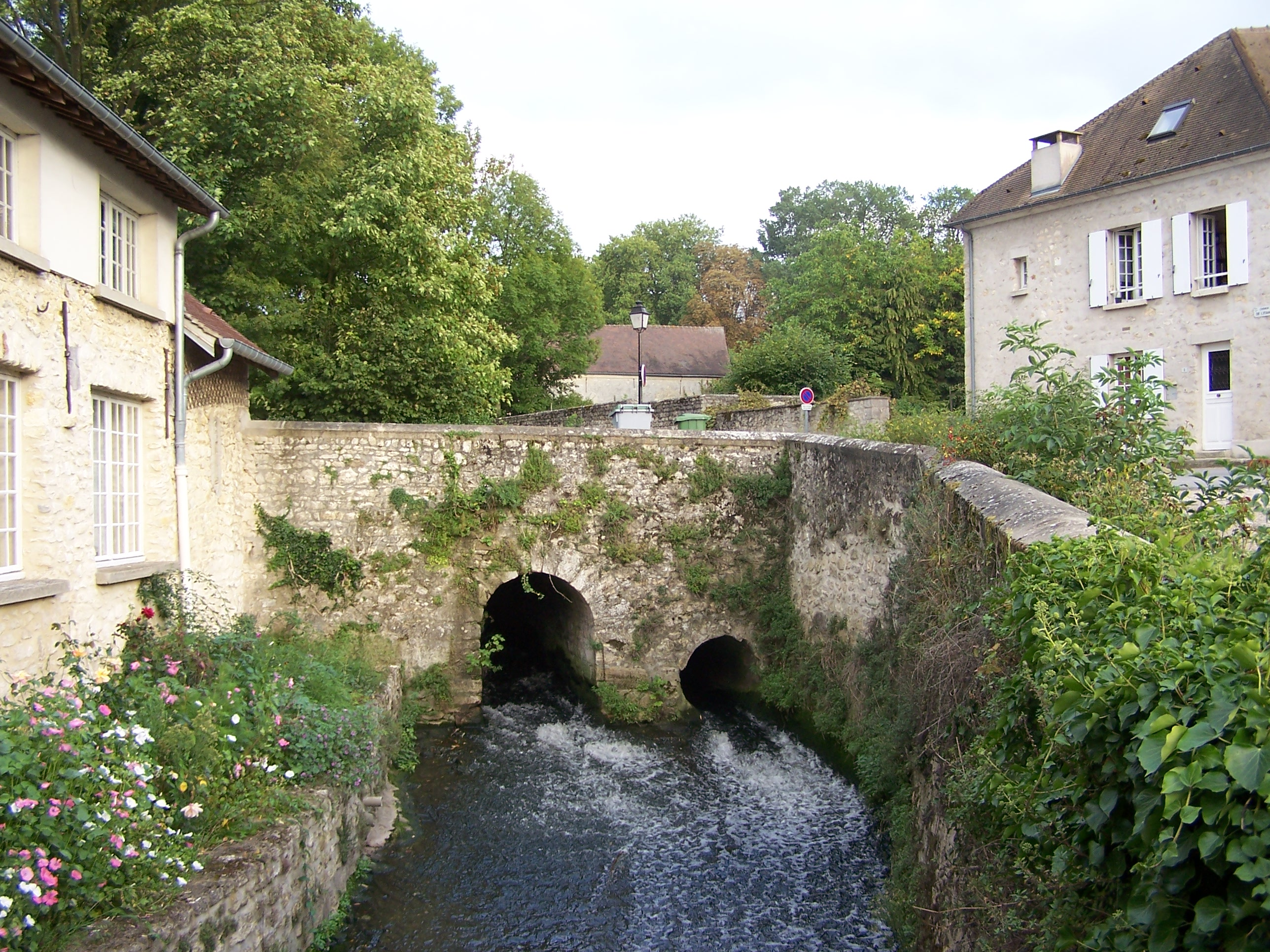 Ru de Gally à Rennemoulin (Yvelines, France). Photo personnelle. Stream ru de Gally in Rennemoulin (Yvelines, France). Personal photo. Auteur/Author : Henry Salomé